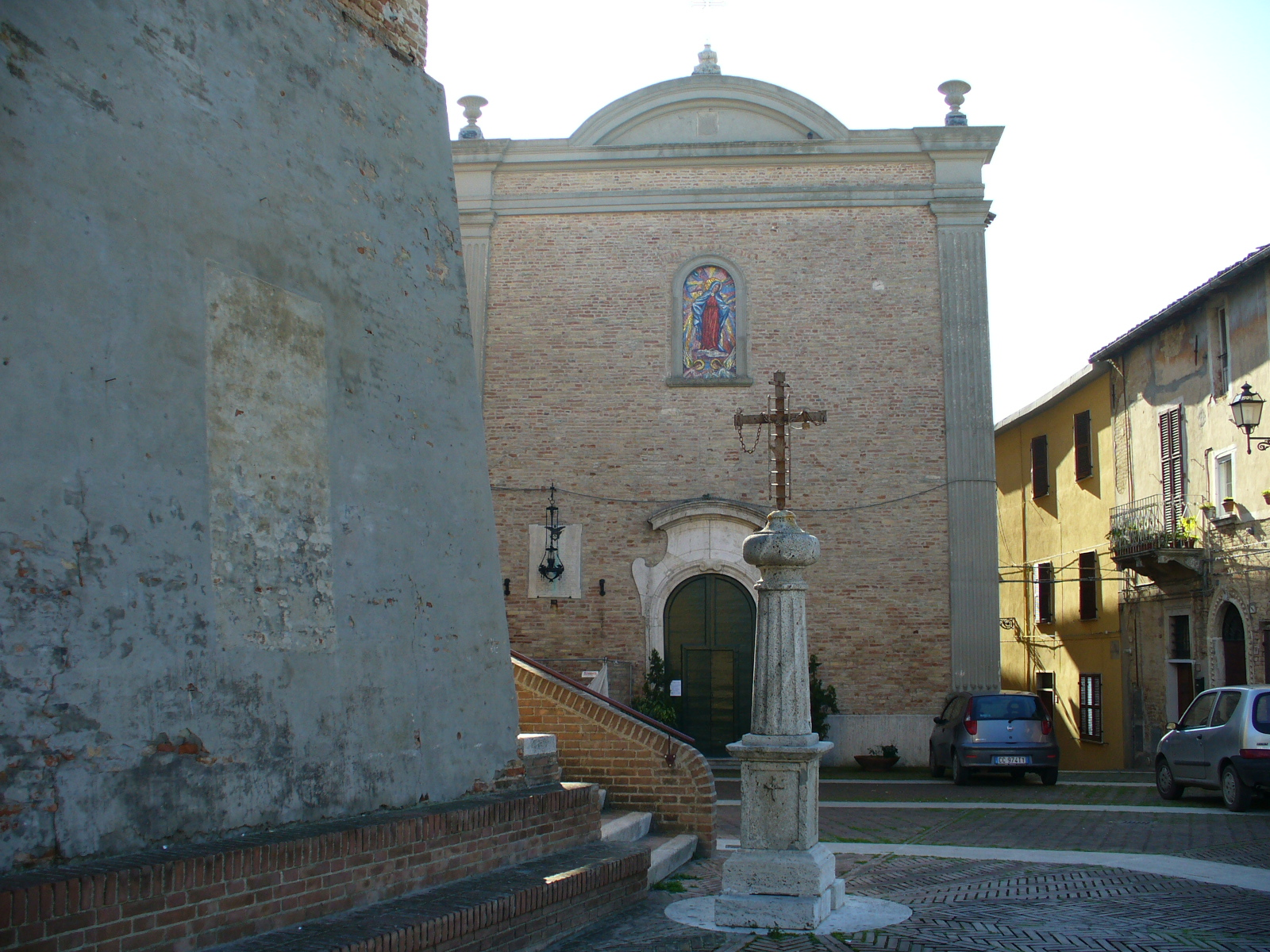 Spinetoli, chiesa della Madonna delle Grazie.